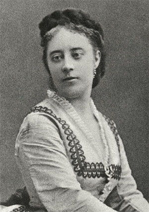 Betty Deland (1831-1882)